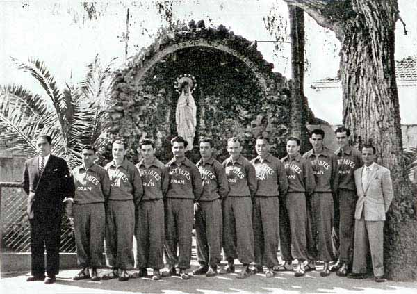 Equipe de Basket-Ball dOran